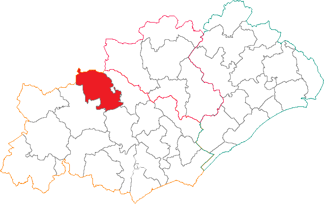 Situation du canton dans le département de l'Hérault.